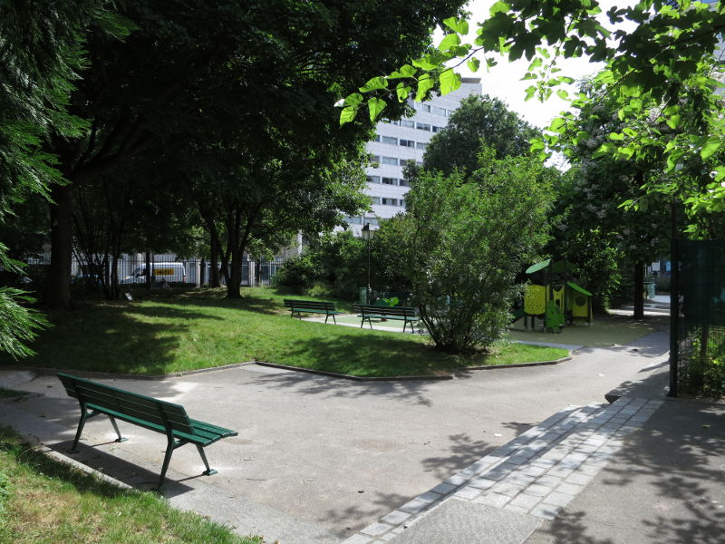 Jardin de la gare de Reuilly, Paris